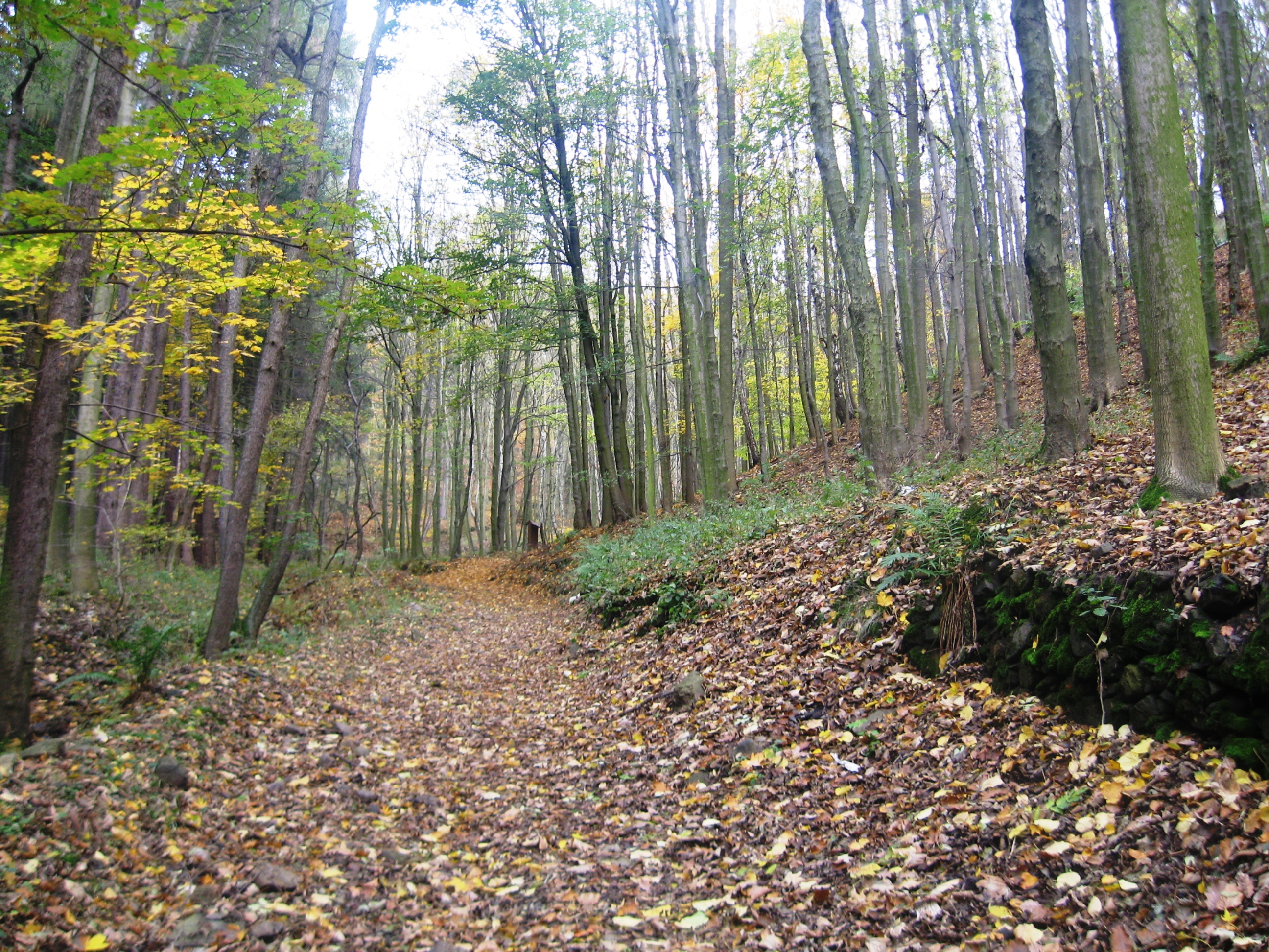 Podzimní pasáž na Naučné stezce Po stopách horníků